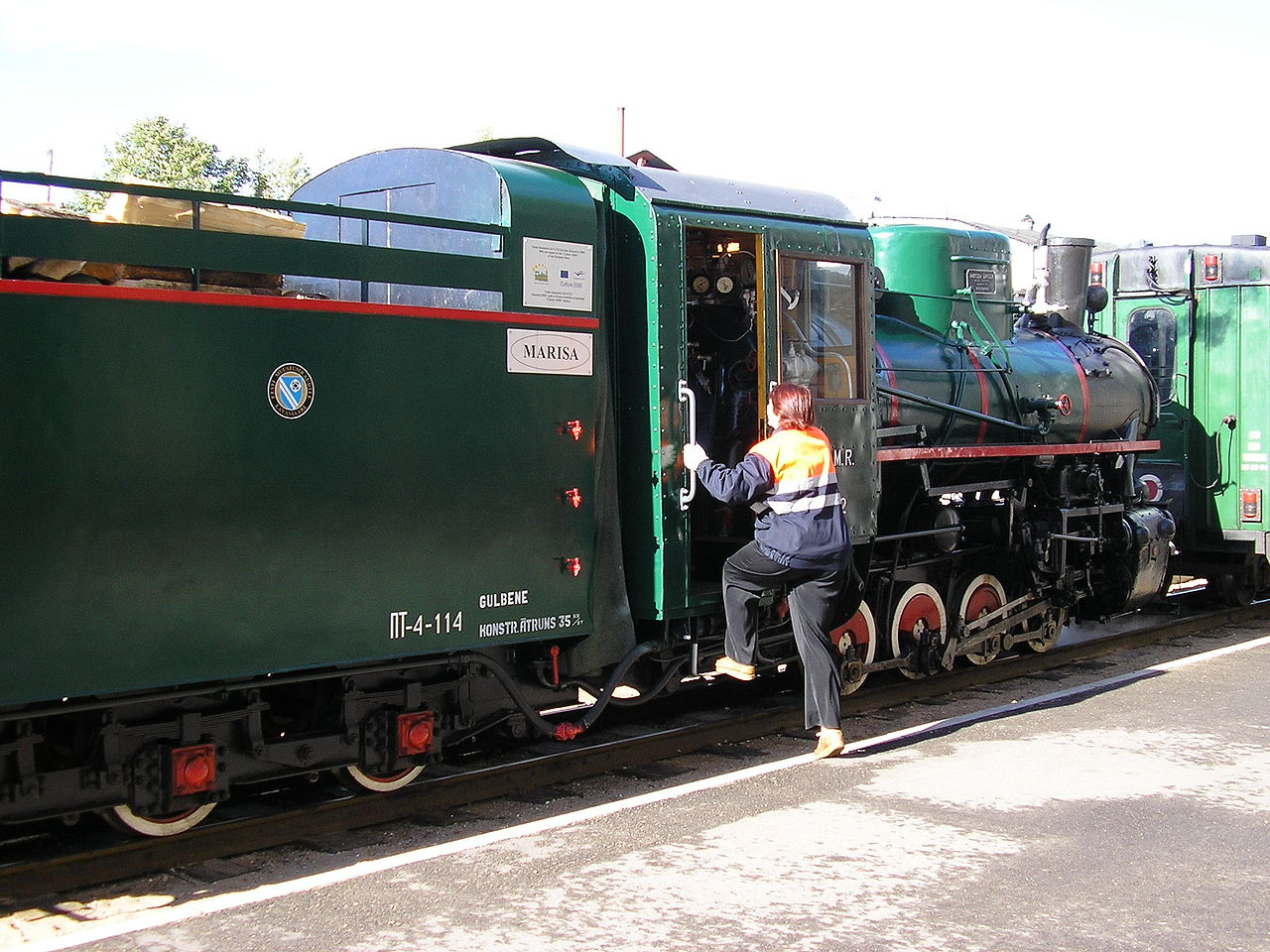 Паровоз Кч4-332 "Мариса" , Гулбене, 2005г.